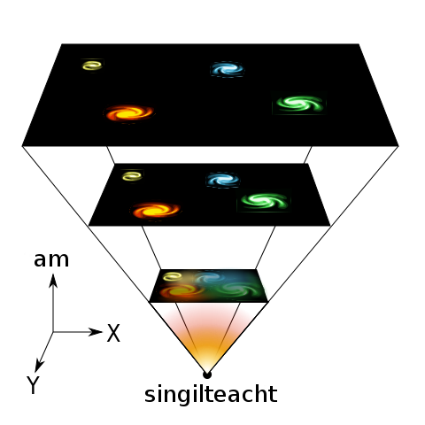 Léiríonn an léaráid seo "slisní spáis" ag pointí éagsúla in am. Tá sé simplithe mar ní léiríonn sé ach dhá cheann de thrí toise spásúil, chun go bhféadfaí an ais ama a thaispeáint go héasca.